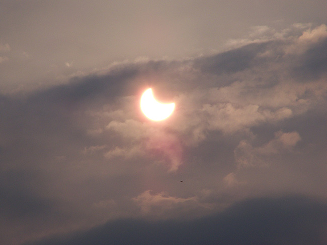 Las fotos del eclipse fueron tomadas desde la terraza del edificio en el que vivo.